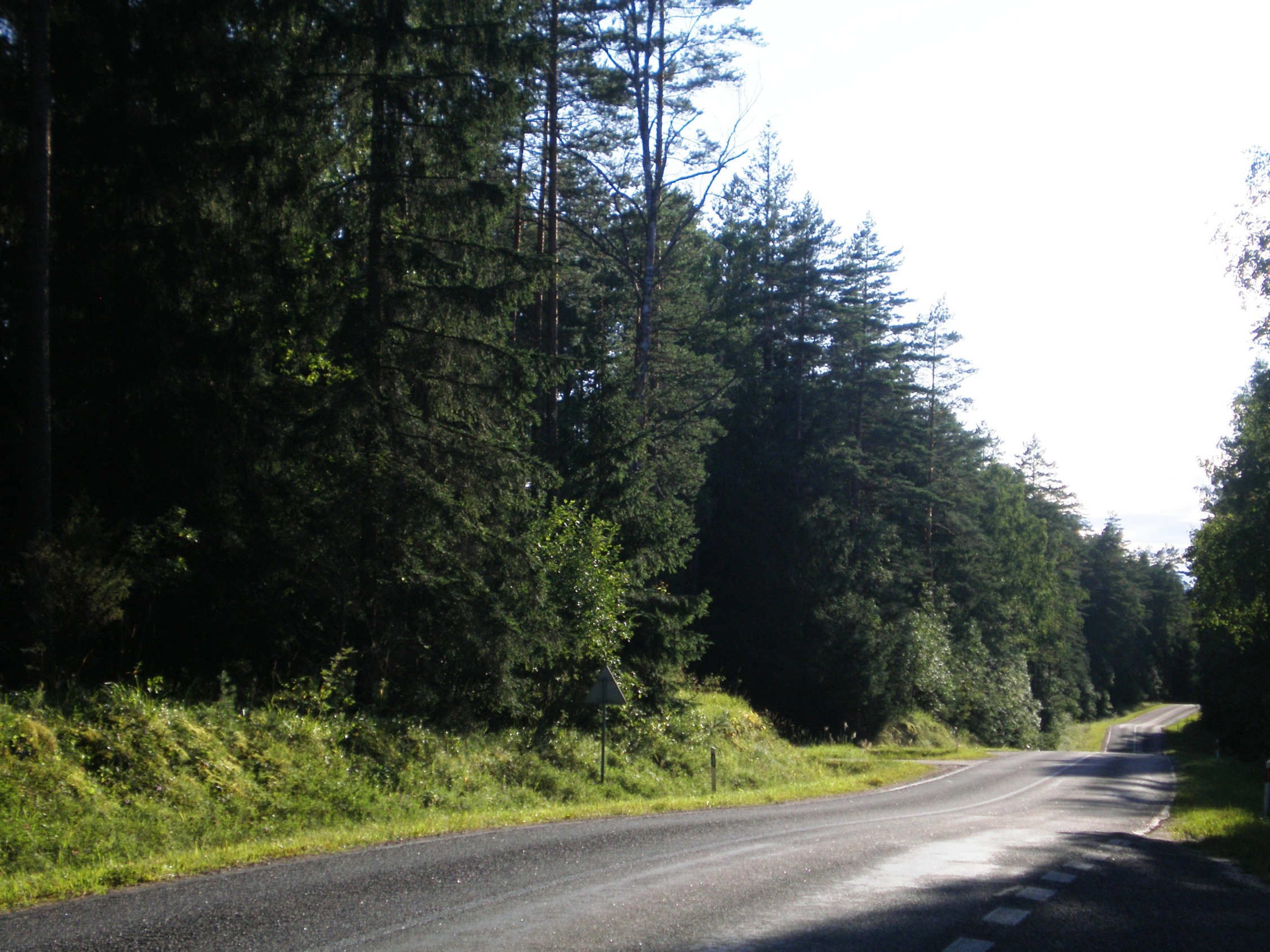 Kelias pro Labanoro girią į vakarus nuo Kūrinių